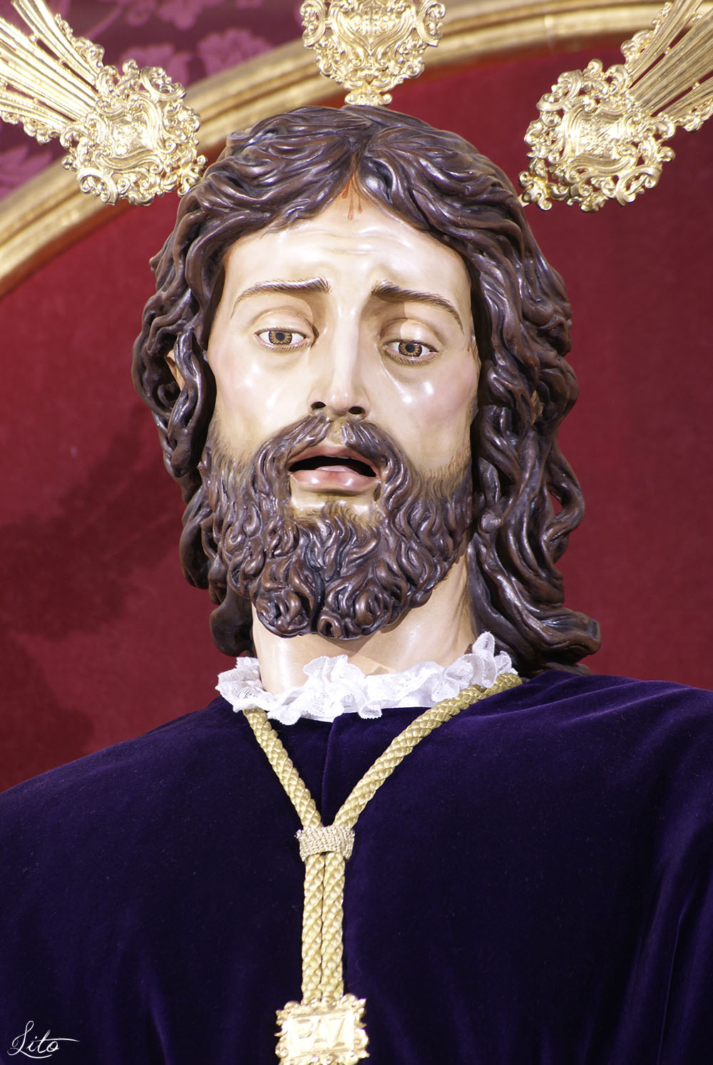 Fotografía propia realizada por Manuel Francisco Álvarez Ruiz.